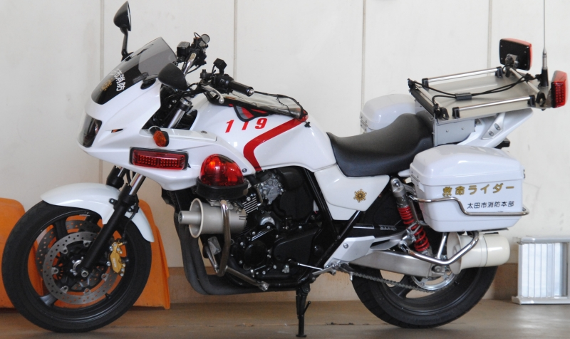 太田市消防本部の救命バイク。太田市防災訓練にて撮影。